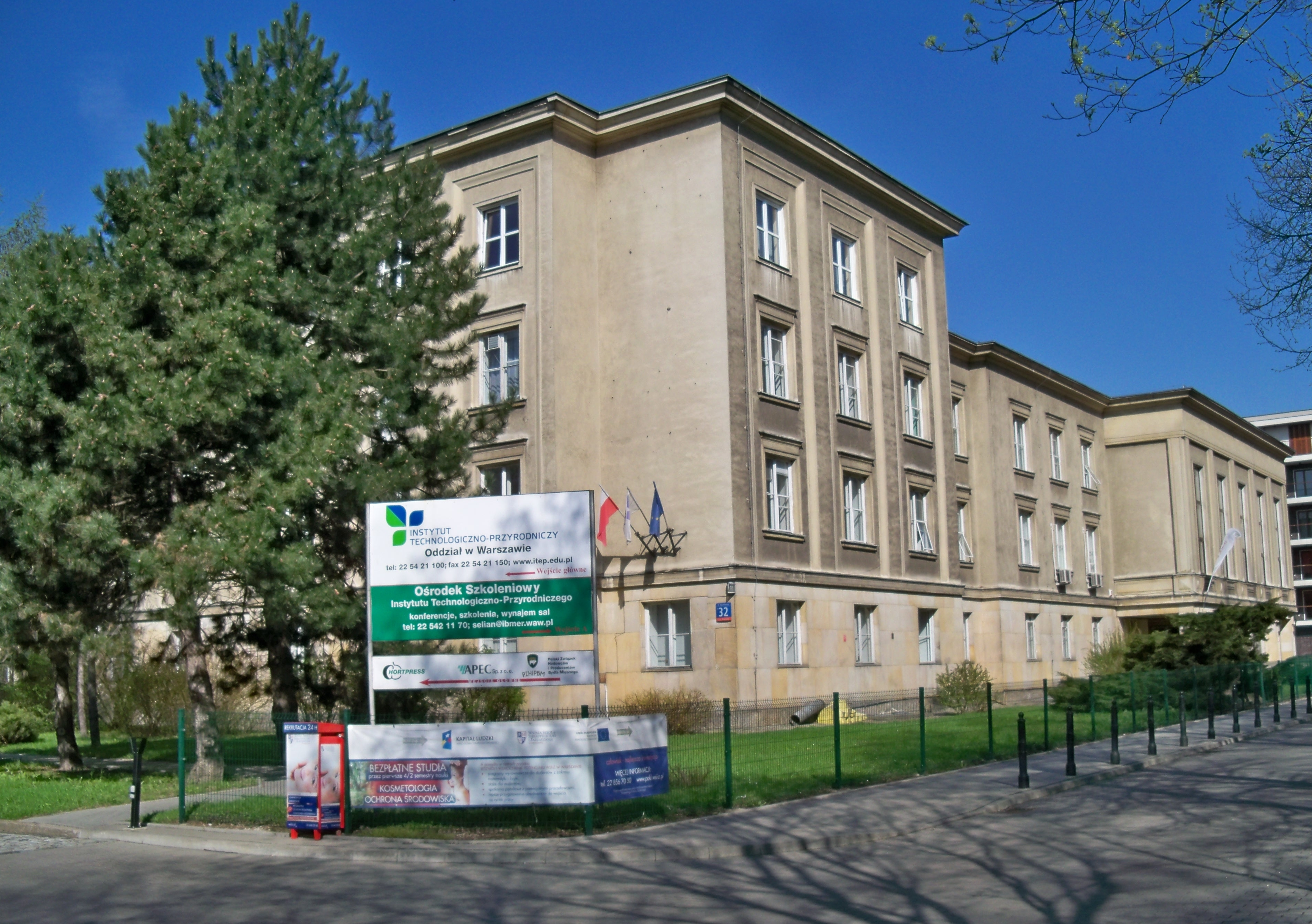 Oddział Instytutu Technologiczno-Przyrodniczego w Falentach – Warszawa, ulica Rakowiecka 32